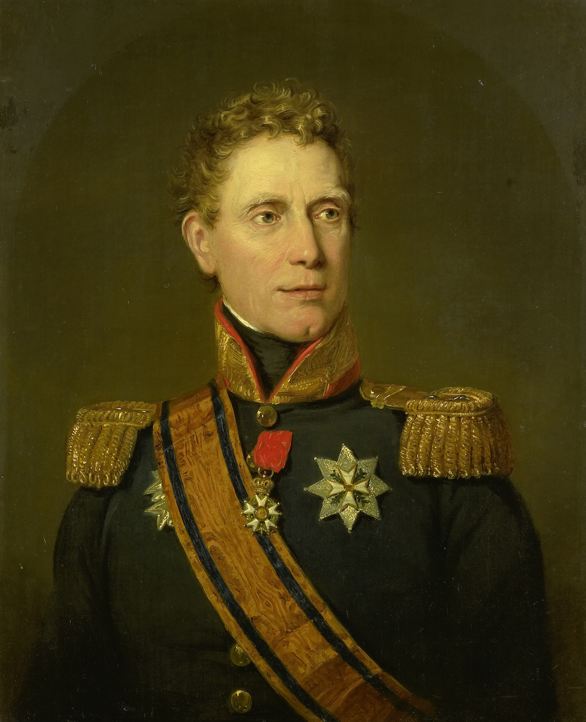 Portret van jonkheer Jan Willem Janssens (1762-1838). Gouverneur van de Kaapkolonie en gouverneur-generaal van Nederlands Oost-Indië. Ten halven lijve, in uniform, het hoofd naar rechts. Sedert 1815 drager van het grootkruis van de Militaire Willemsorde.